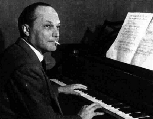 Italian composer Mario Peragallo